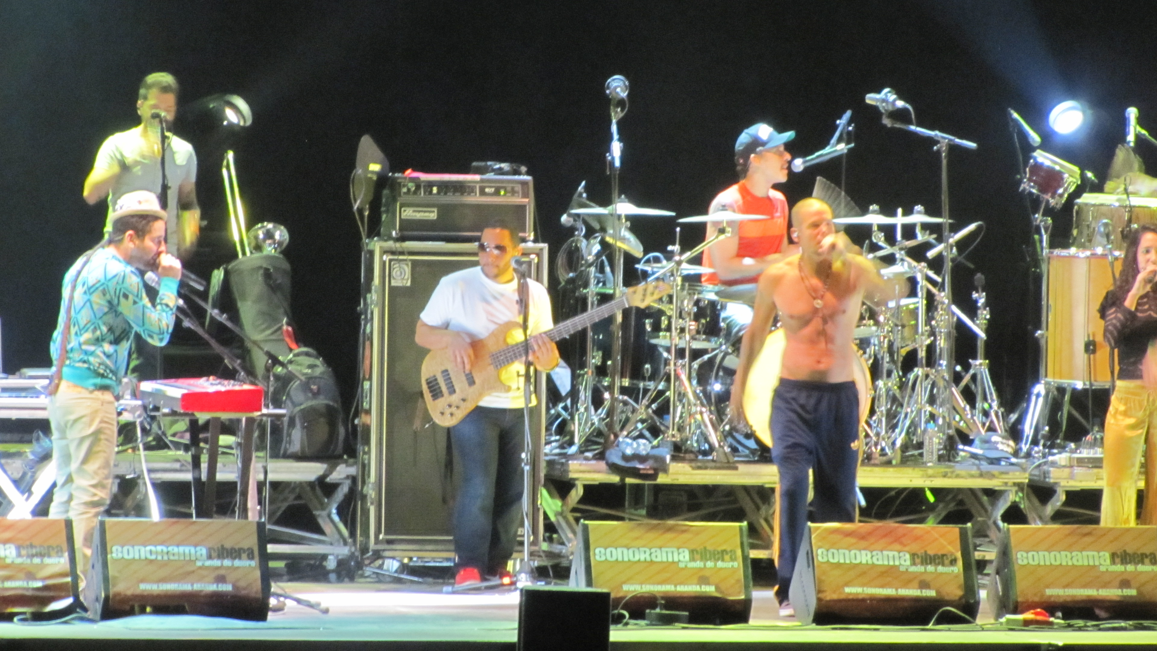 Concierto de Calle 13 durante el Festival Sonorama Ribera 2012 en el Escenario Principal